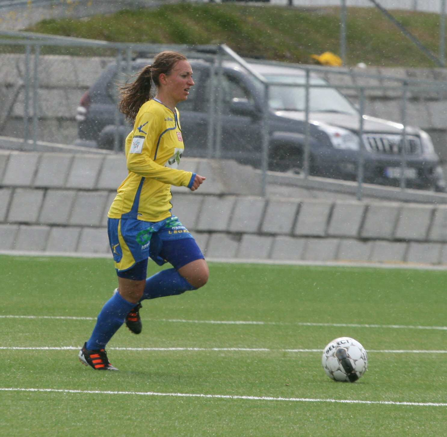 Fotballspilleren Andrea Haugstøyl